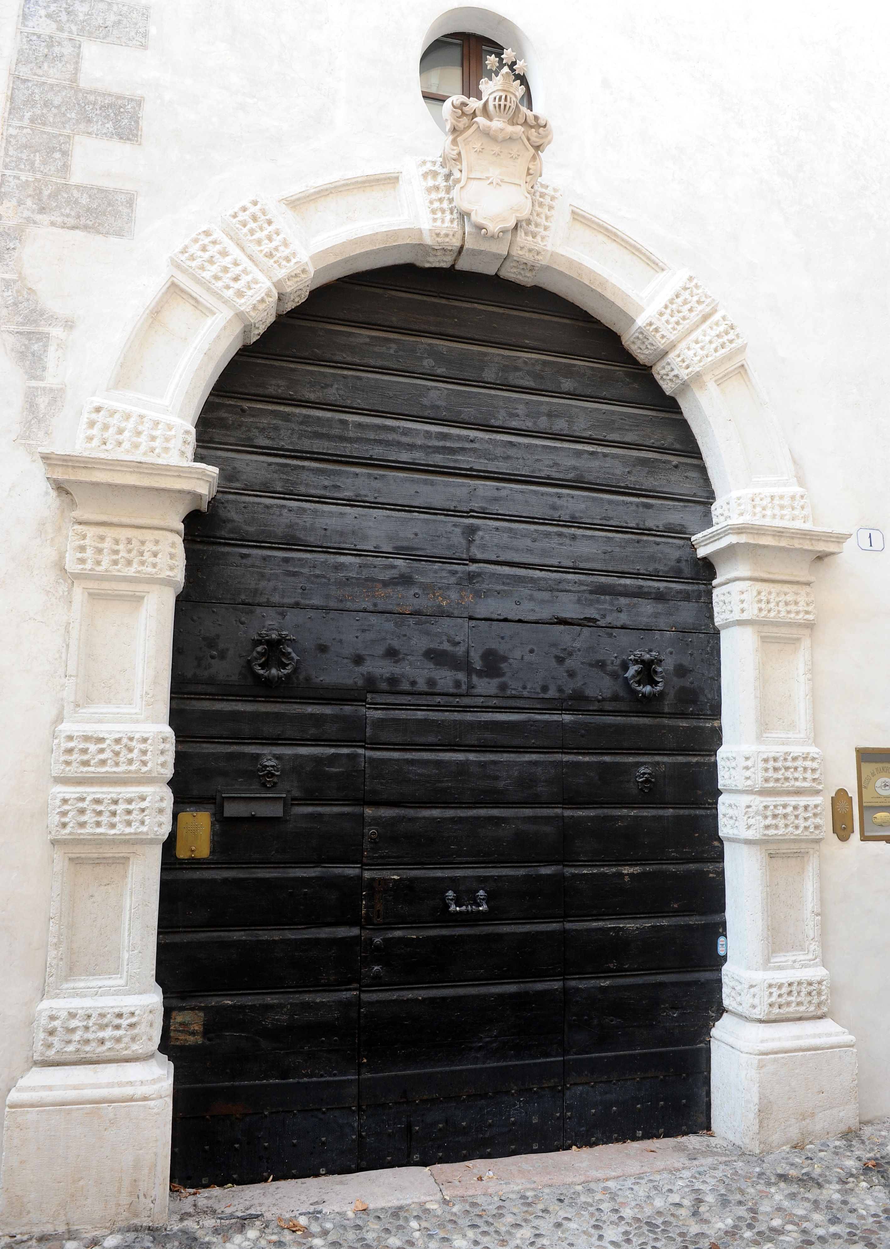 Palazzo Zanderighi-Malfatti, Ala. This is a photo of a monument which is part of cultural heritage of Italy.